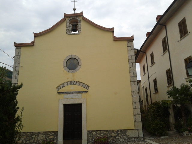 Chiesa del Sacro Cuore di Gesù a Cesoli dei Marsi